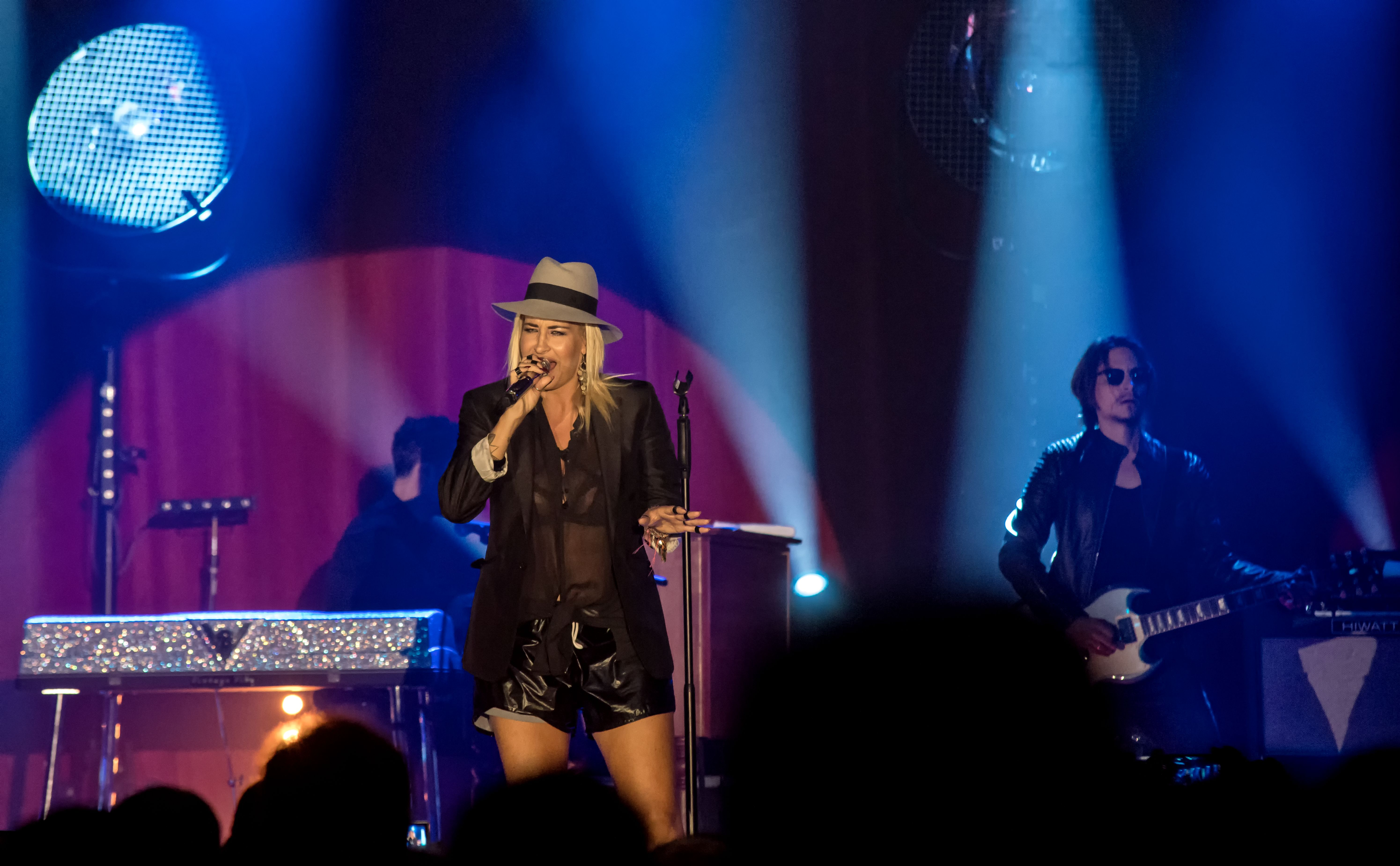 Bilder vom Zelt Musik Festival 2016 in Freiburg im Breisgau Sarah Connor